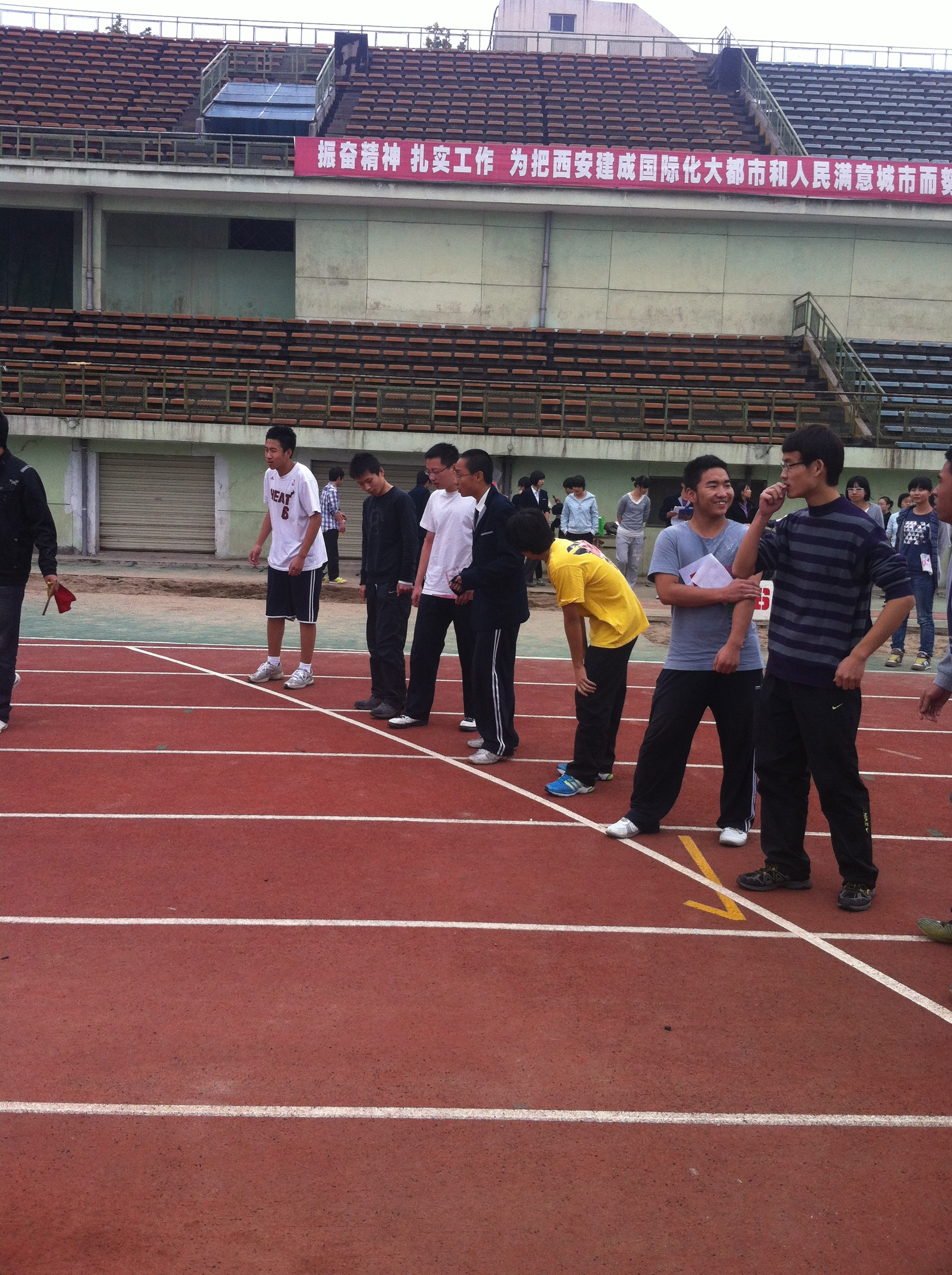 位于校运动会起跑线的西安市第26中学的参赛选手们，拍摄于西安市体育场。